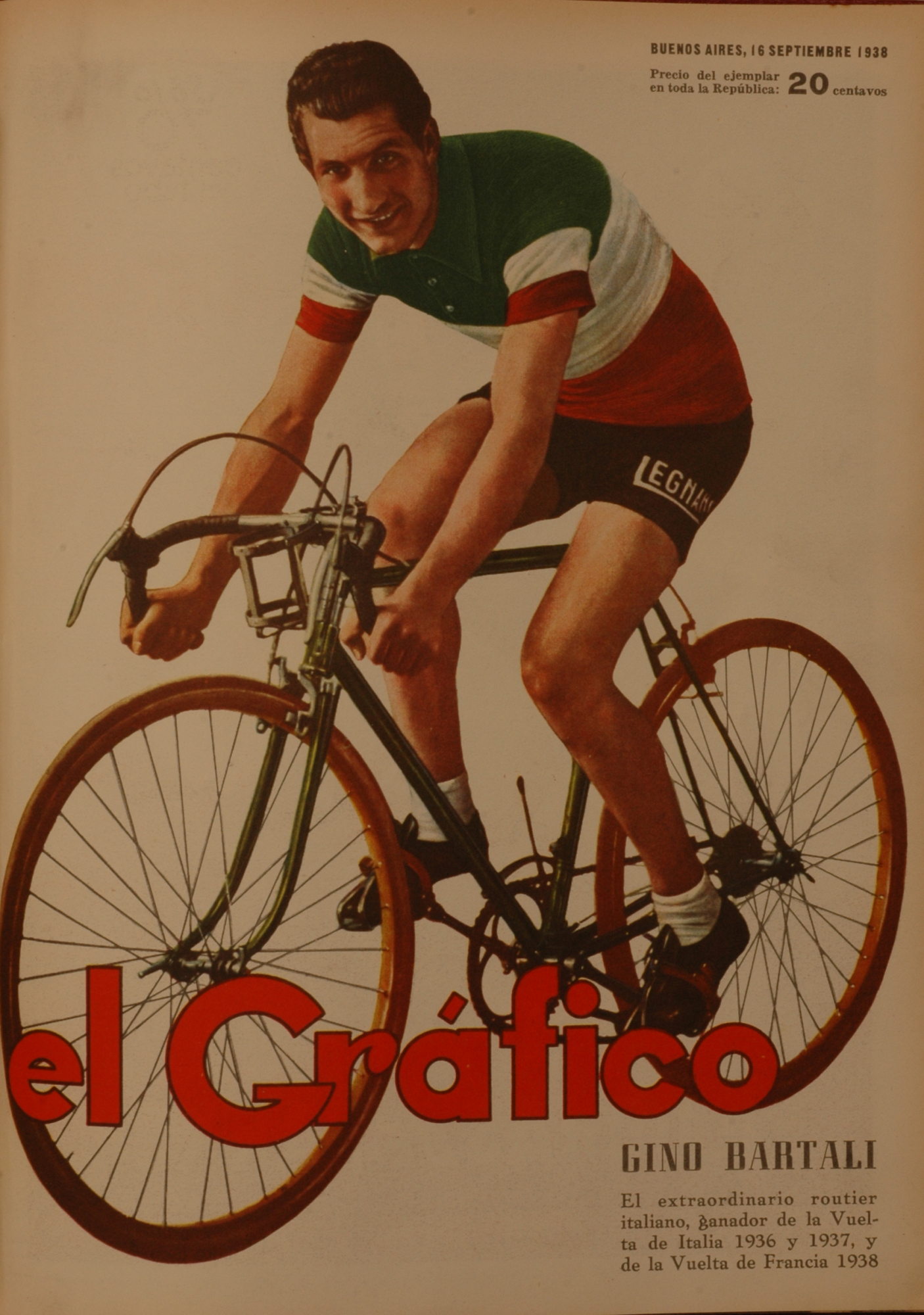 El Grafico del 16 de Septiembre de 1938. Edicion 1001